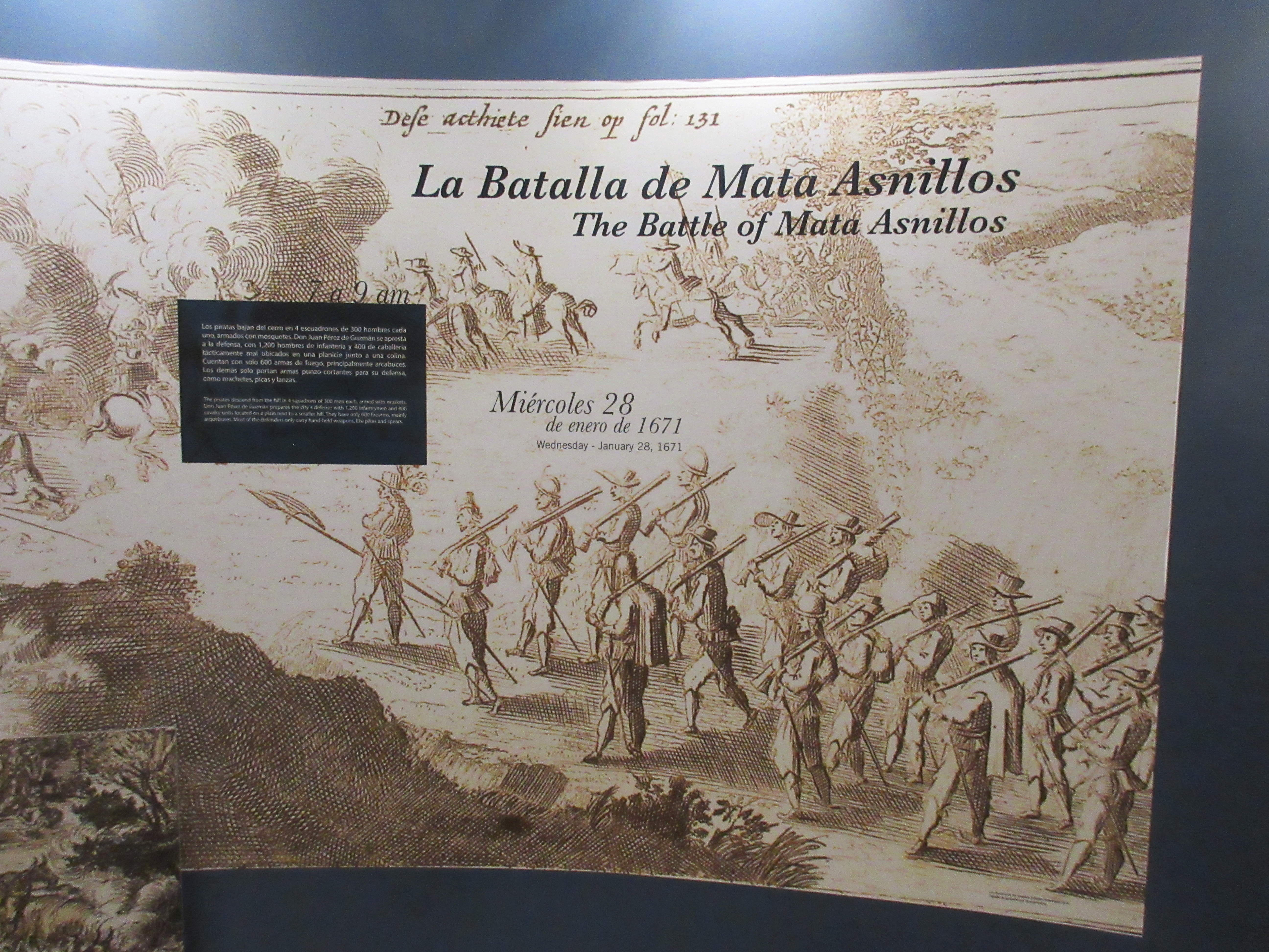 La bataille de Mata Asnillos (ou sac de Panama), cité située à 1 mile de Panama Viejo. Arrivée des pirates